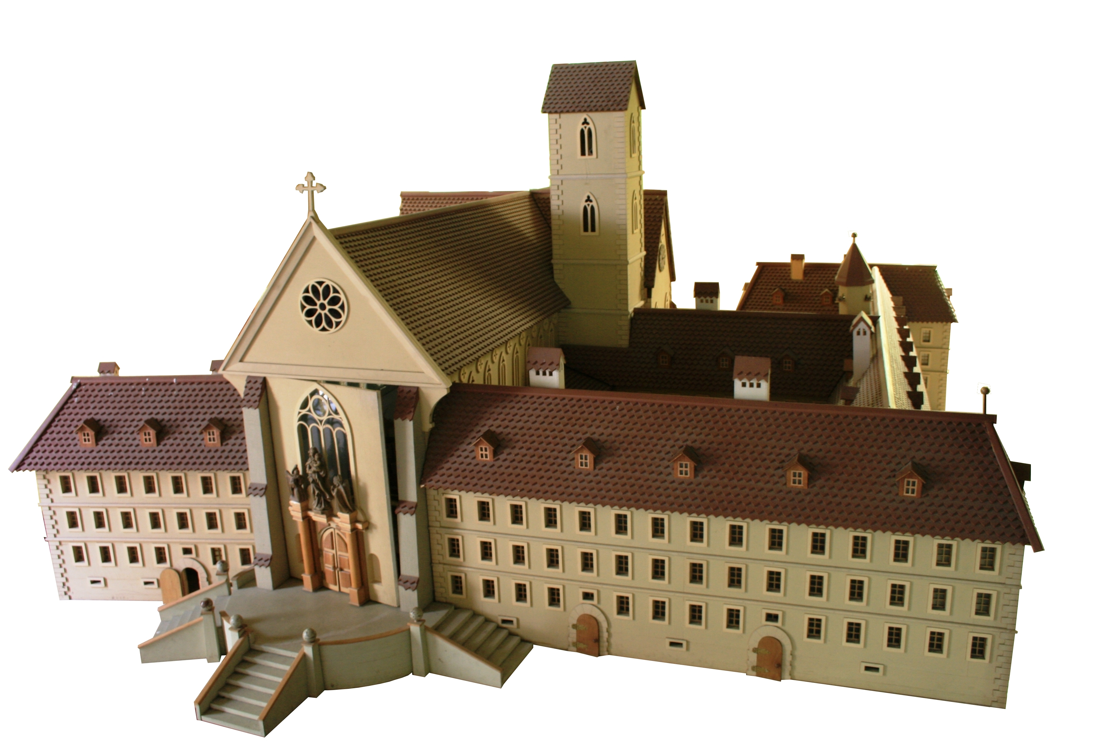 Modell des Klosters Lützel, Lucelle, Elsass; steht in der Renggli-Kapelle in Lucelle